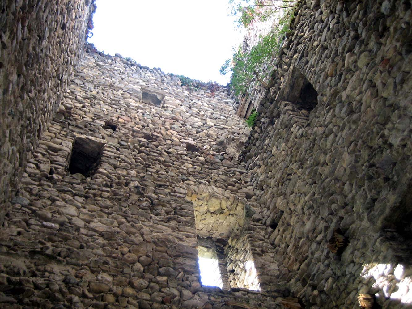 Strassberg-Turm von innen